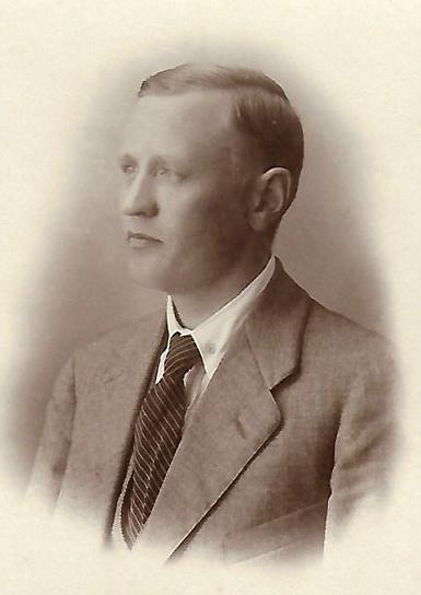 Salon Seudun Osuusmeijerin isännöitsijä 1915